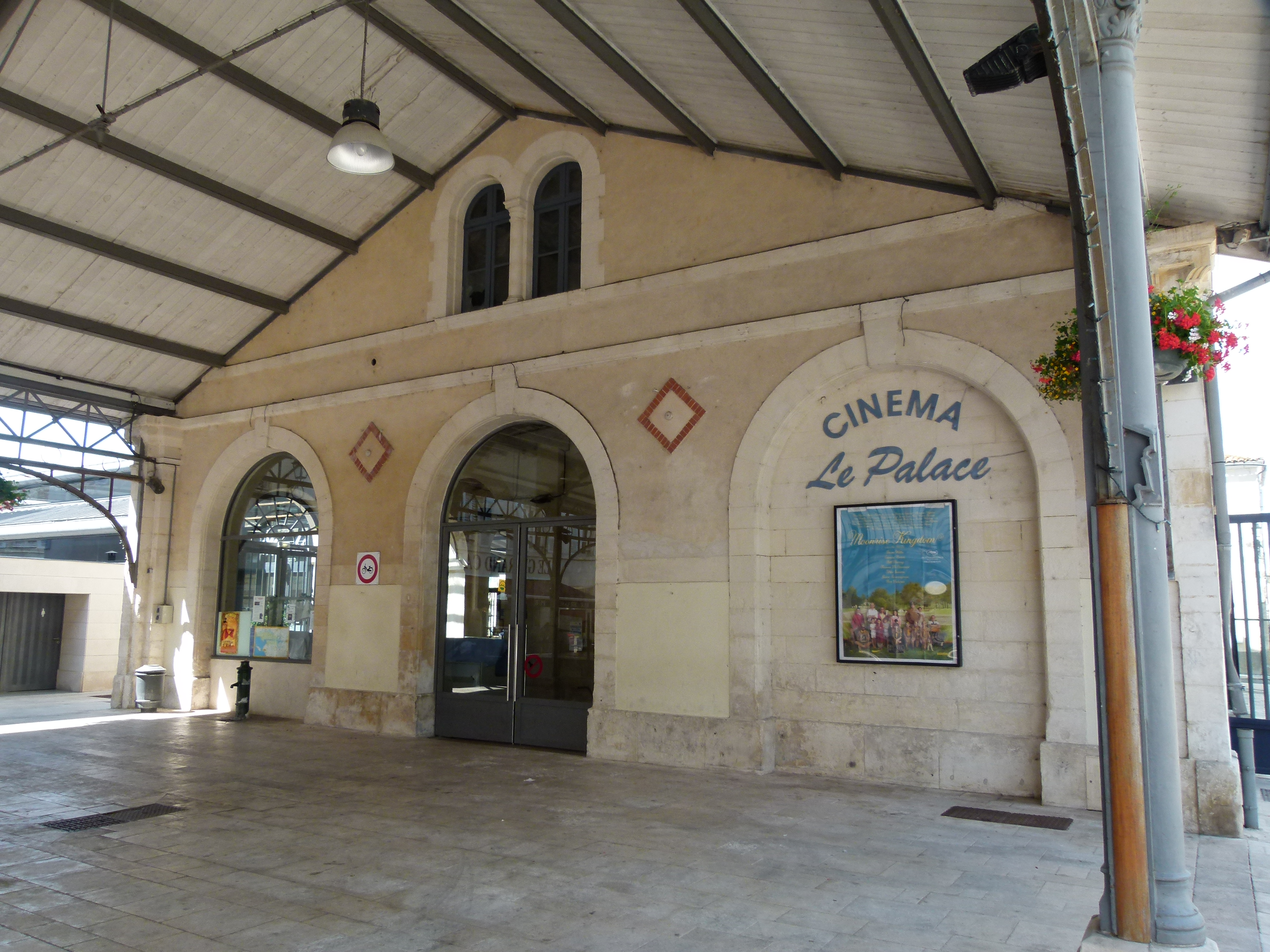 Le cinéma de Surgères est situé dans la place des Halles